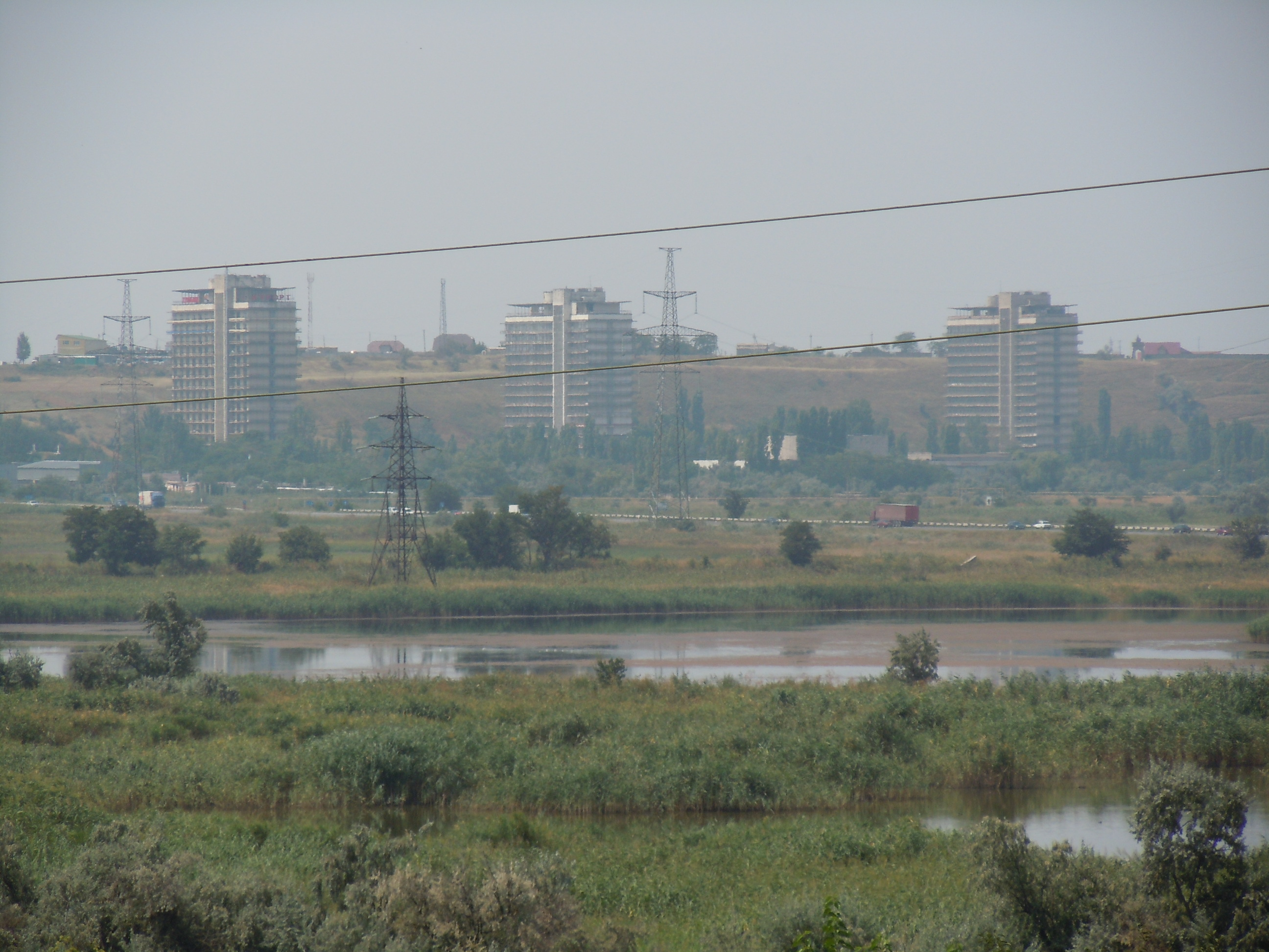 Вид на Санаторій Куяльник, Лузанівські ставки і Куяльницький лиман з селища Шевченка, Одеса